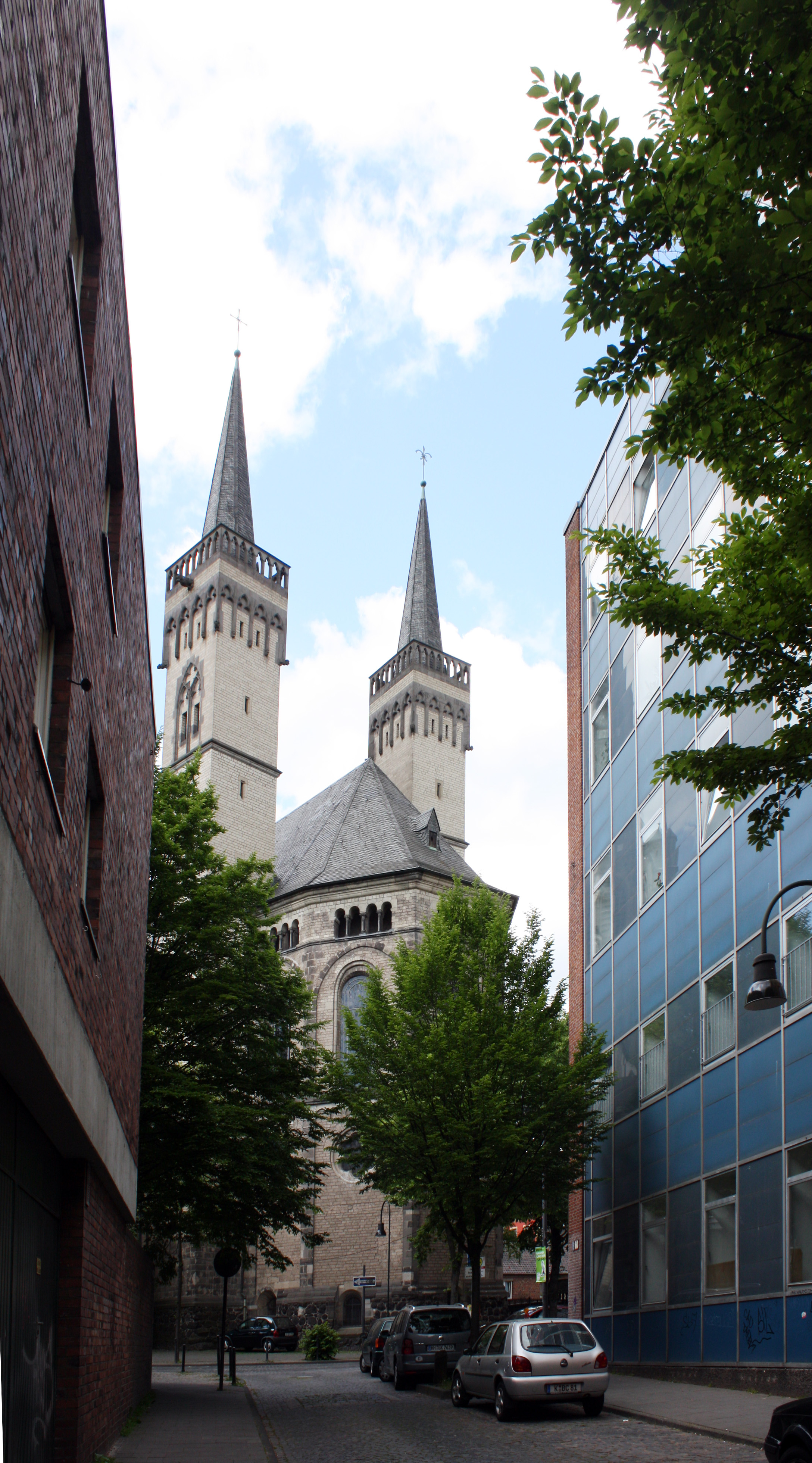 St. Severin Köln, Chorseite